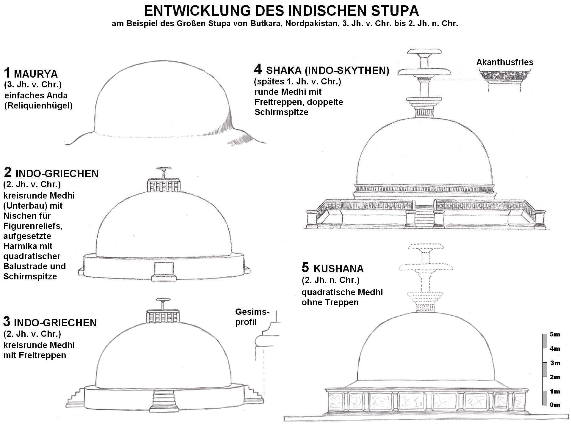 Entwicklung des indischen Stupa am Beispiel des Großen Stupa von Butkara (Nordpakistan), 3. Jh. v. Chr. bis 2. Jh. n. Chr. Grafik erstellt auf der Grundlage von Image:ButkaraStupa.jpg